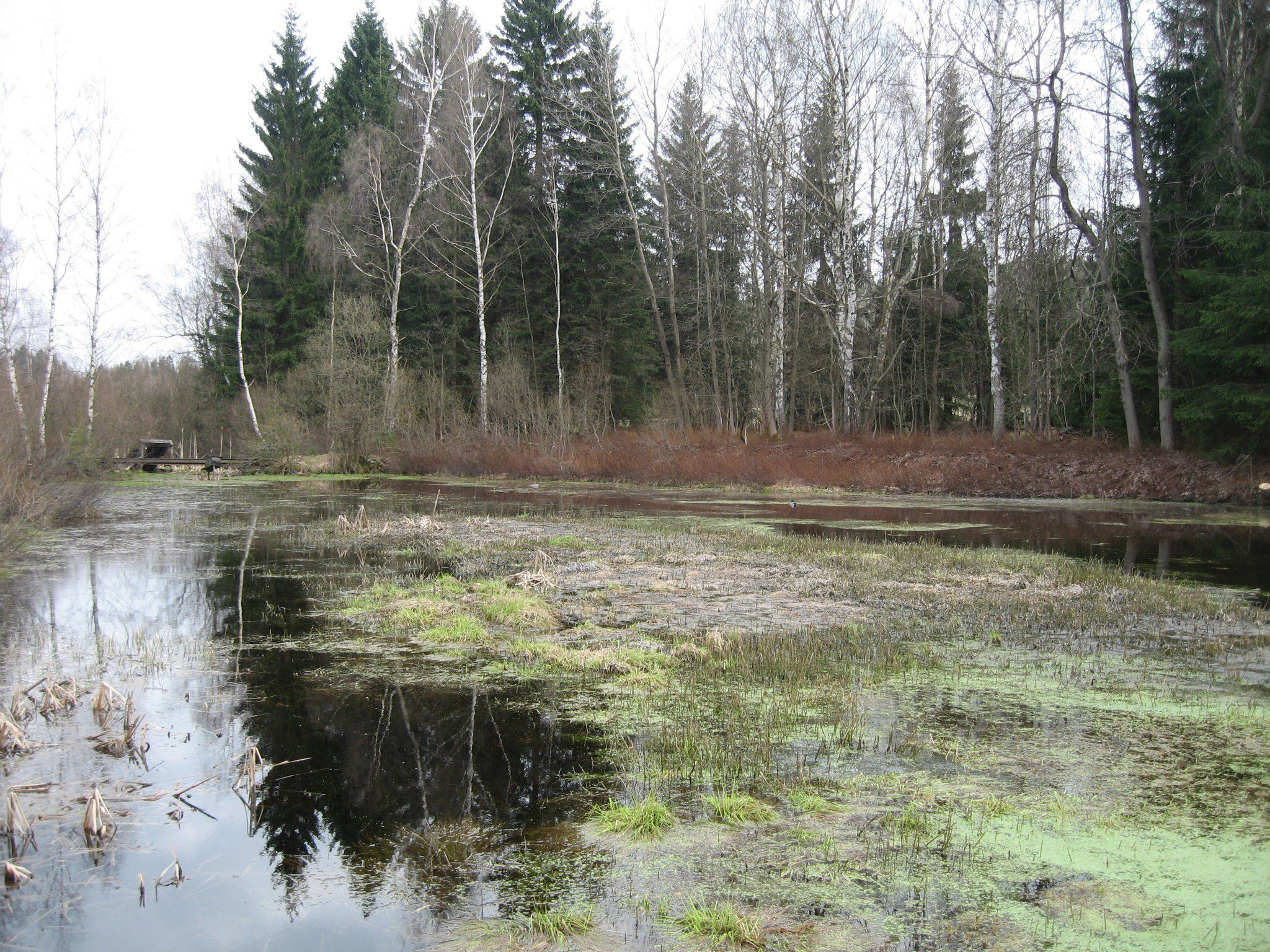 Zarostlá hladina Maxovského rybníku těsně před odbahněním a pravou hráze. Jaro 2013